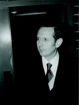 Foto di Peter Dombrowski